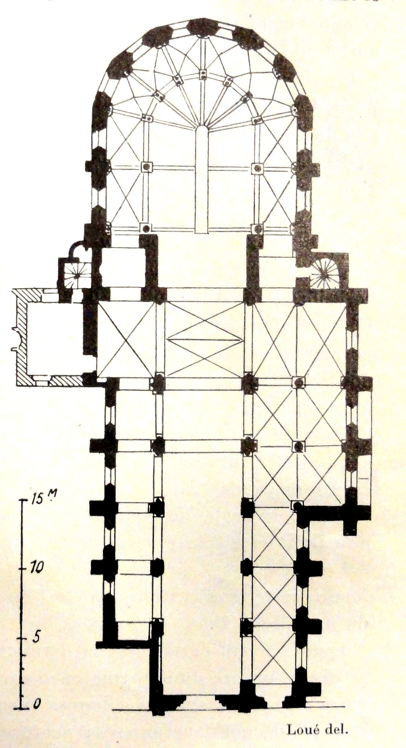 Plan de l'église, relevé par l'architecte Loué en 1861 lors de la constitution du dossier en vue du classement de l'église.